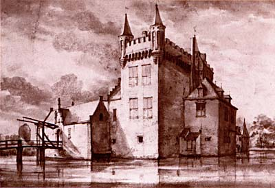 Kasteel Keenenburg in Schipluiden